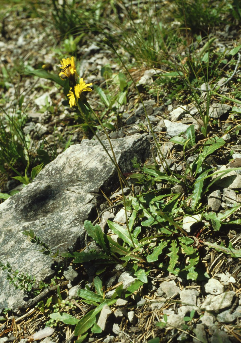 Glatter Schlitzblatt-Wiesen-Leuenzahn (Leontodon hispidus subsp. hyoseroides), Korbblütengewächse (Asteraceae) - Österreich/Austria/Autriche: Tirol, Fernpass